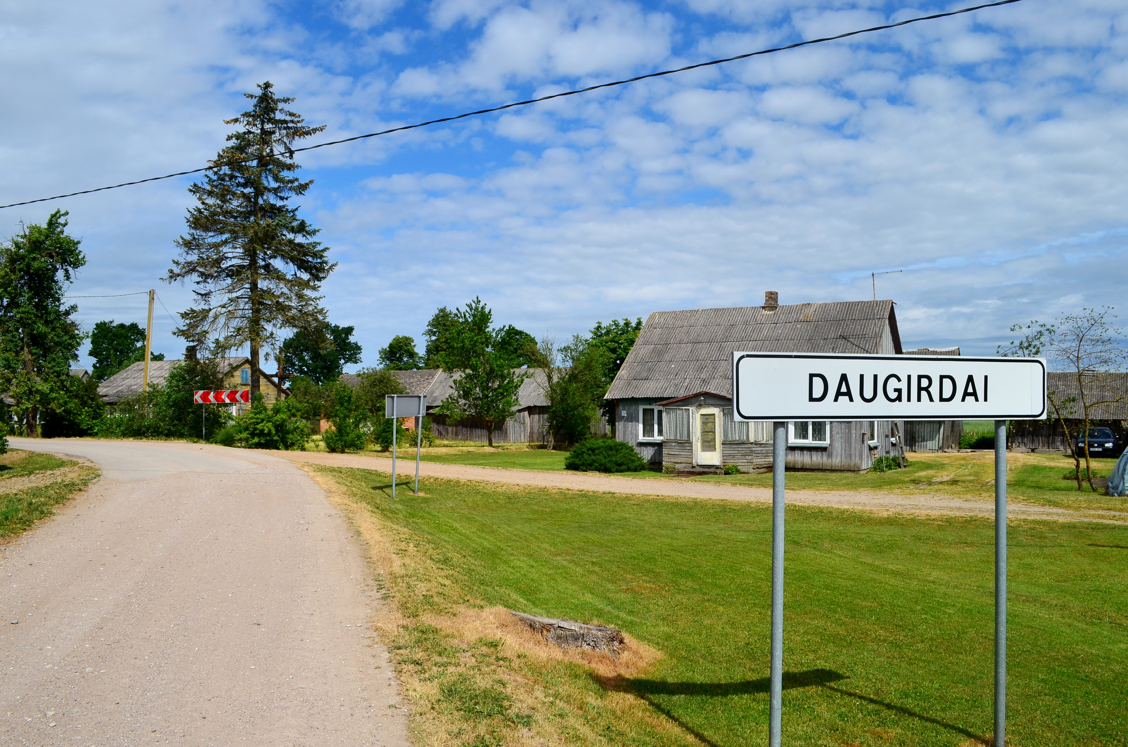 Daugirdai, Alytaus raj.